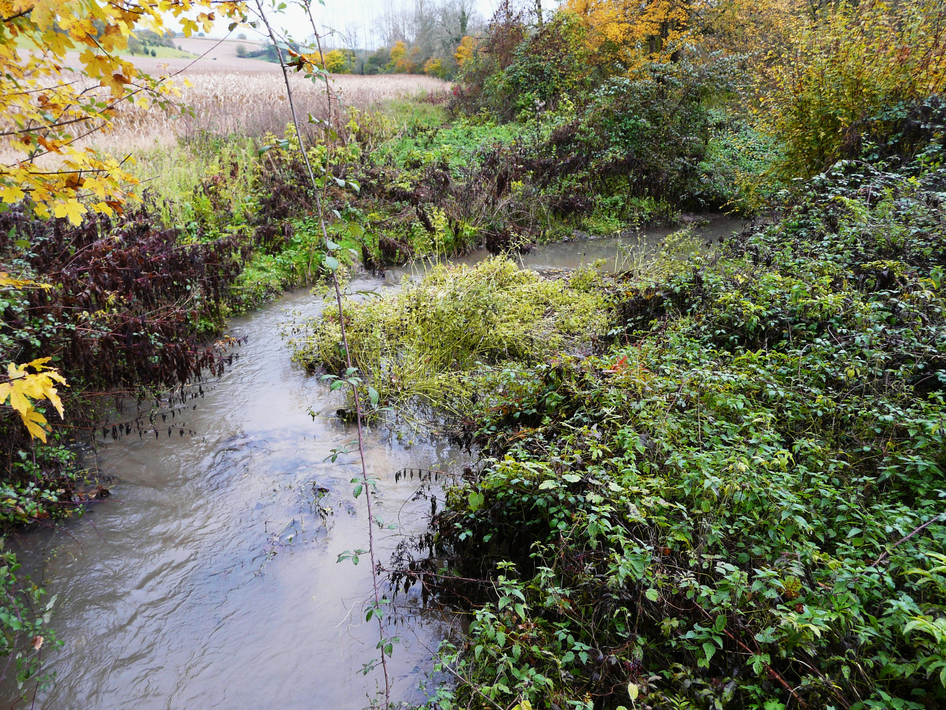 Ruisseau la Peychay près du lieu-dit les Bigoussies, entre Saint-Méard-de-Drône et Ribérac, Dordogne, France